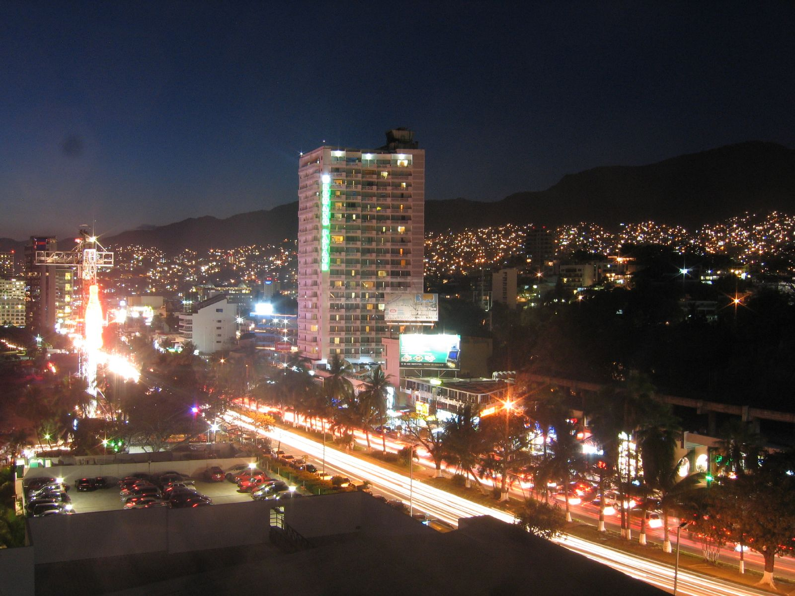 Avenida Costera Miguel Alemán en la zona de la Condesa de Acapulco, México.